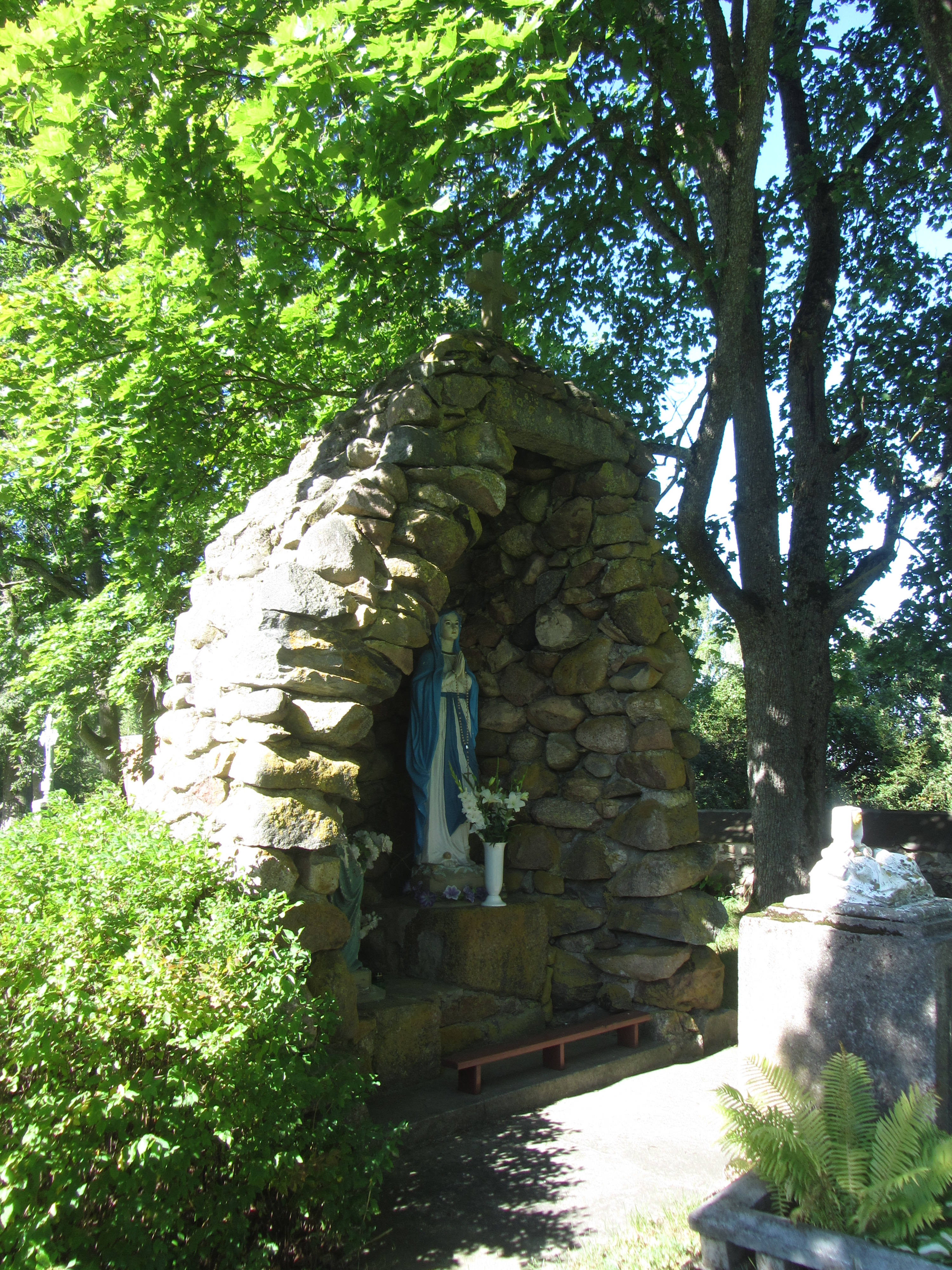 Skapiškis, Lithuania